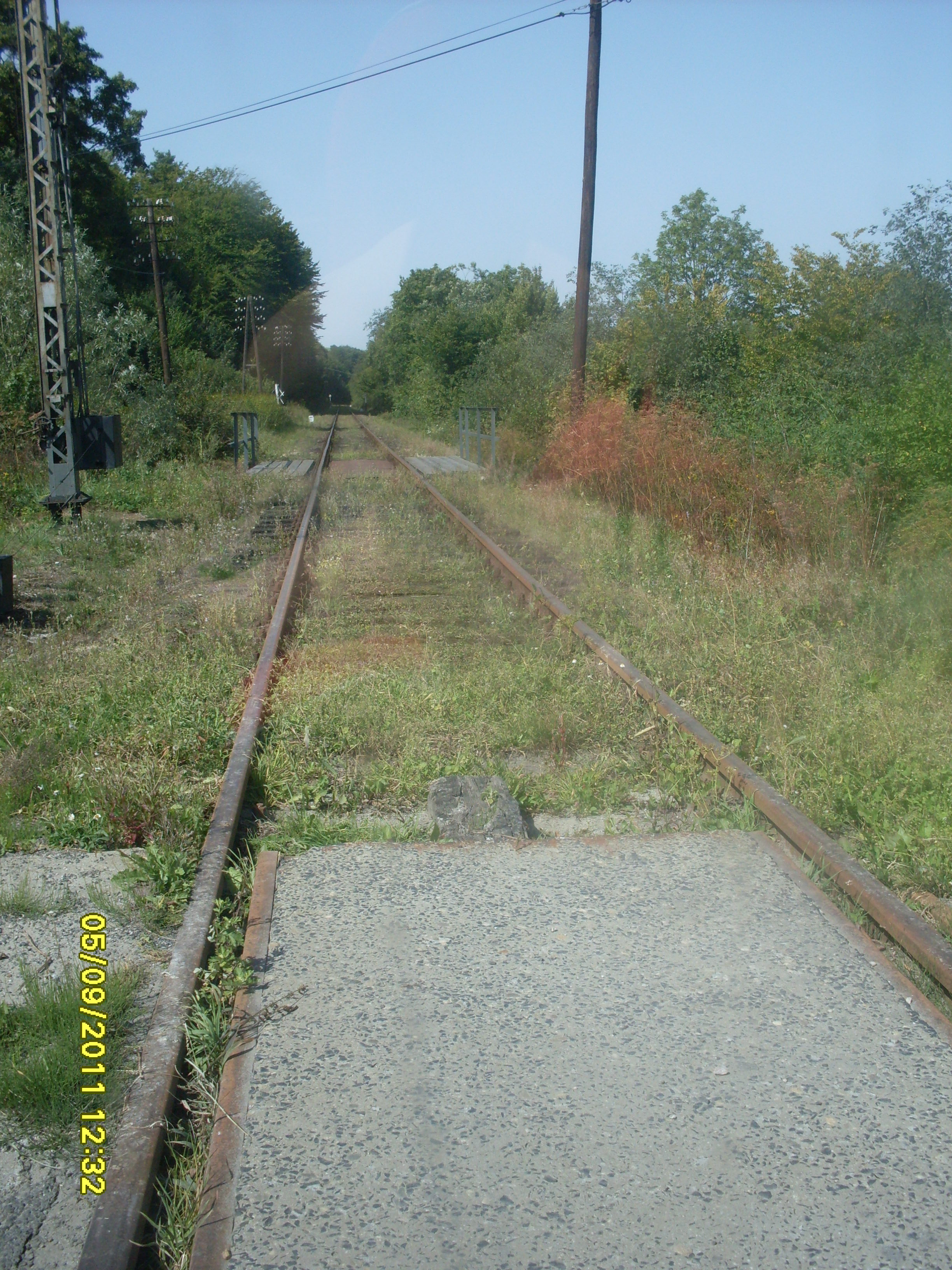 linia Kolejowa 107 w miejscowości Szczawne w stronę Zagórza.